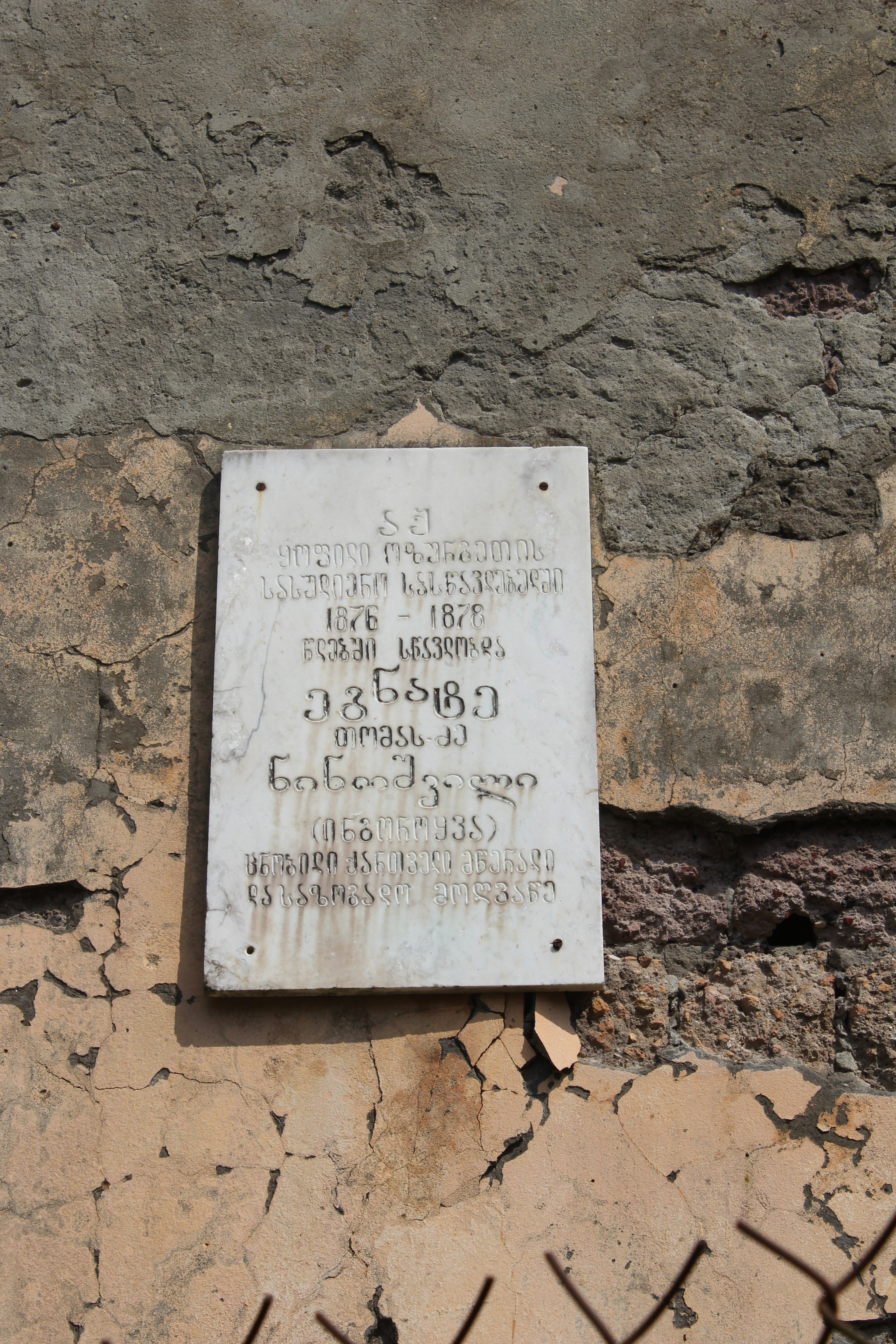 პირველი საჯარო სკოლის ძველი შენობა